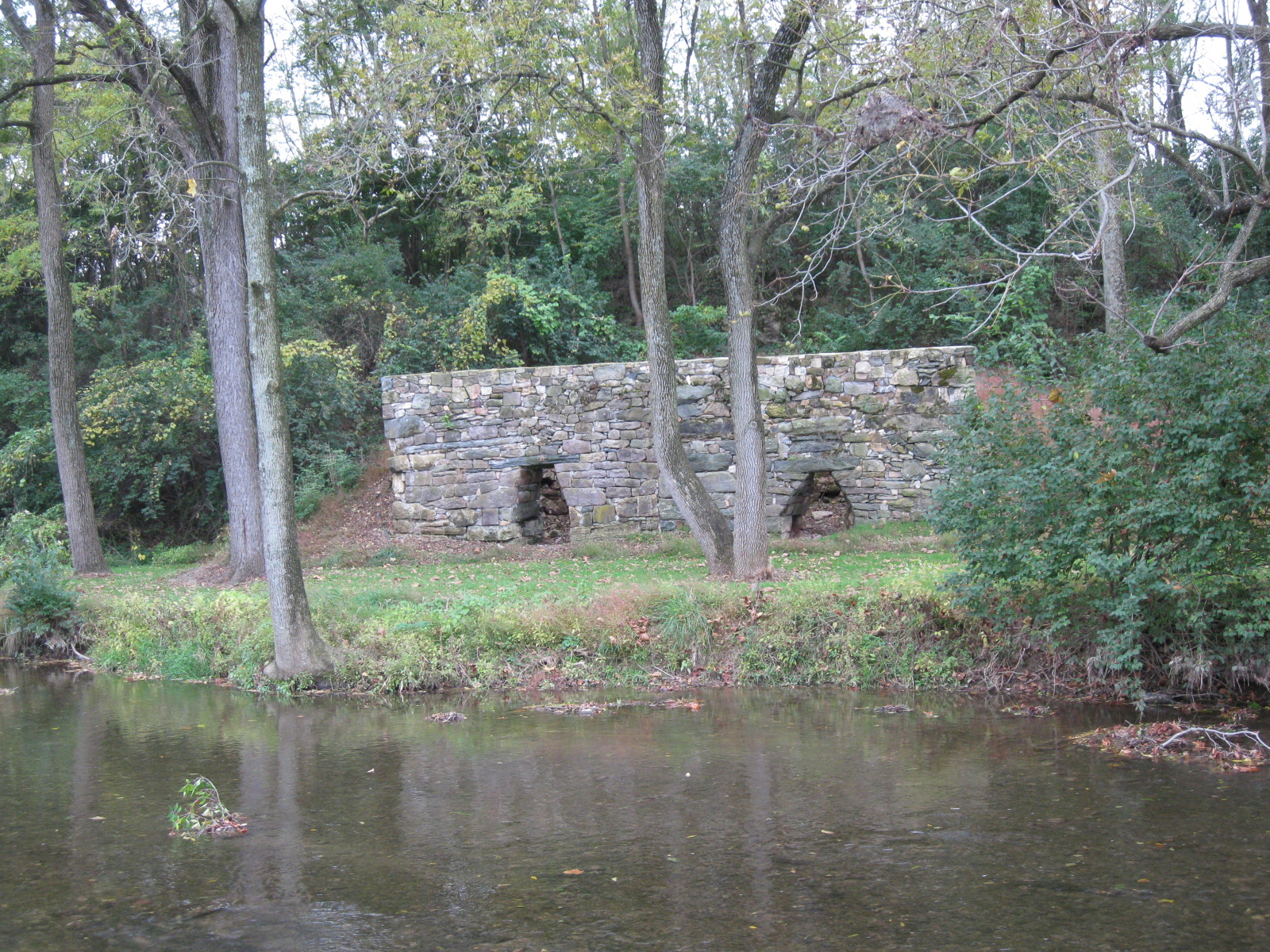 Poole Forge - Pennsylvania